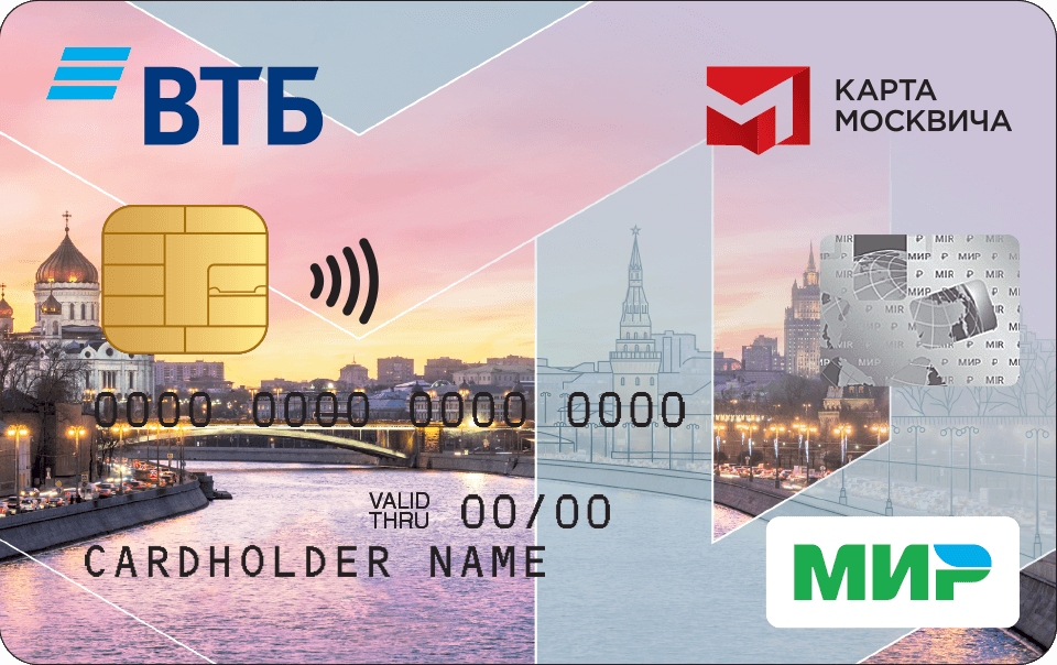 Карта москвича c логотипами